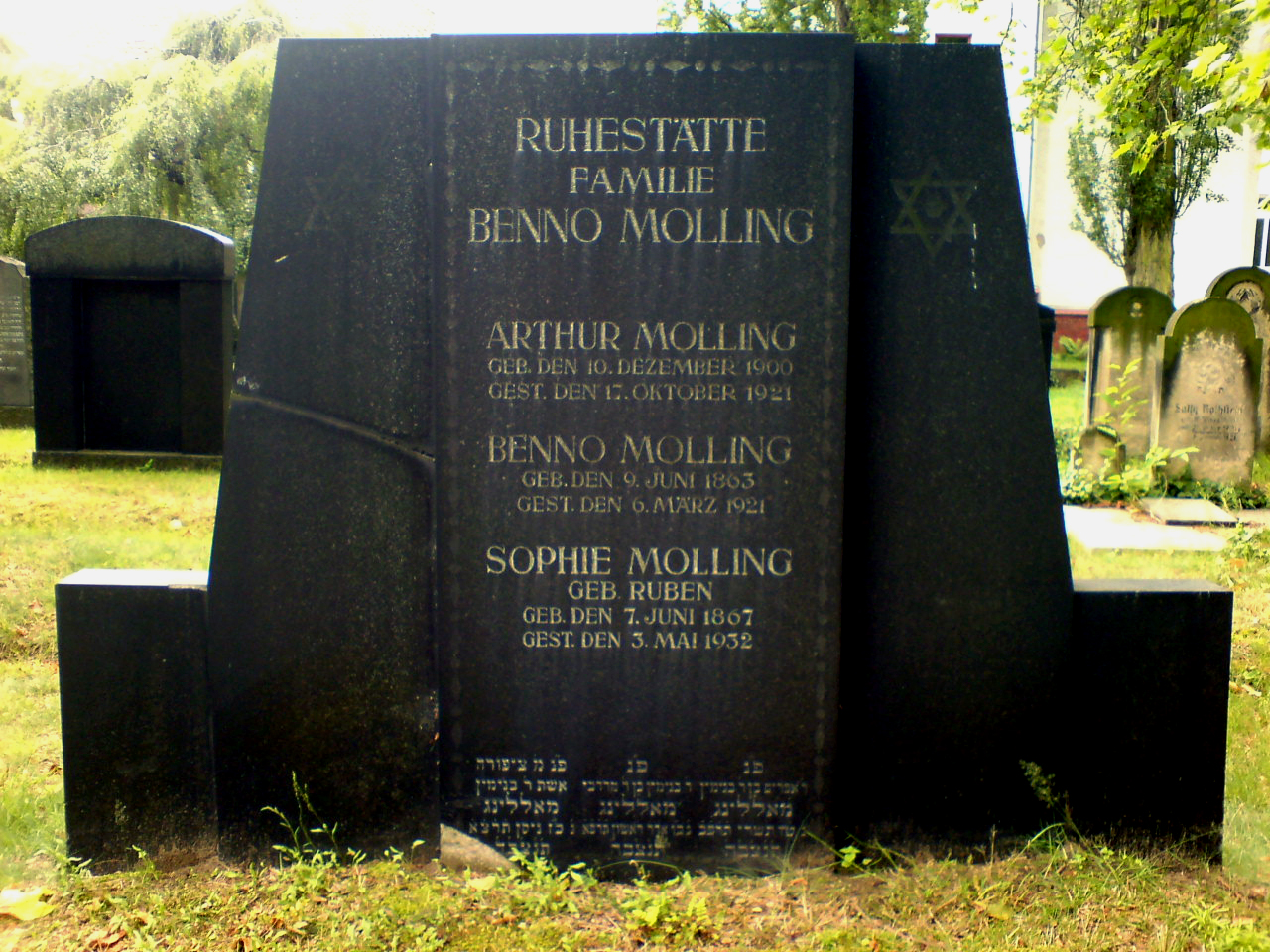 Grabmal der Familie Benno Molling auf dem Jüdischen Friedhof an der Strangriede in Hannover